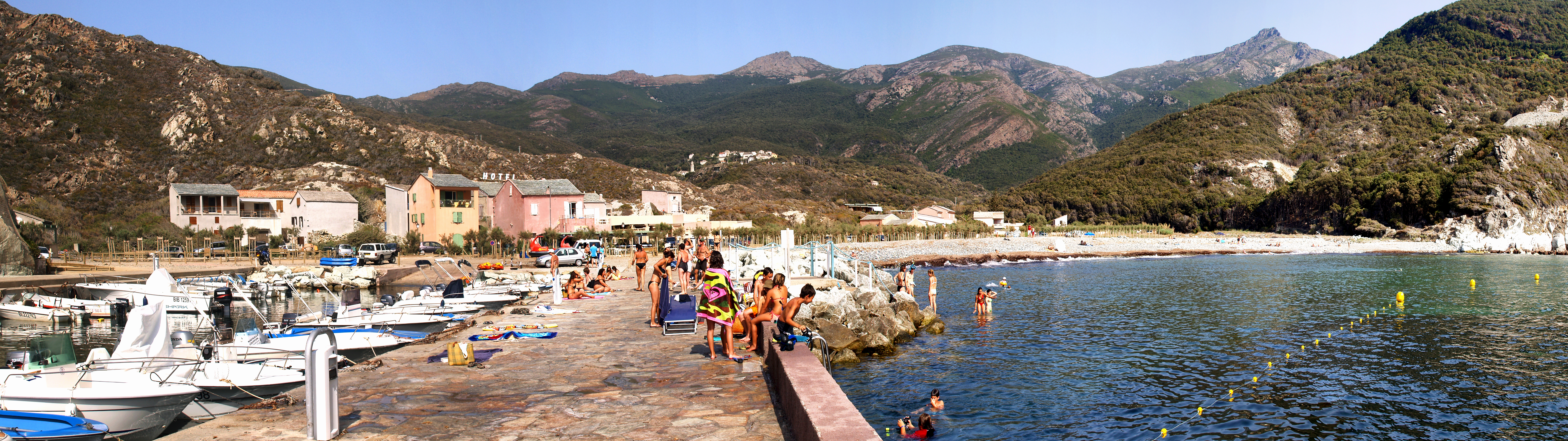 Barrettali, Cap Corse - La marine de Giottani avec et sa plage et son petit port au pied des ruines d'une tour génoise. À l'arrière-plan, le village de Conchiglio.